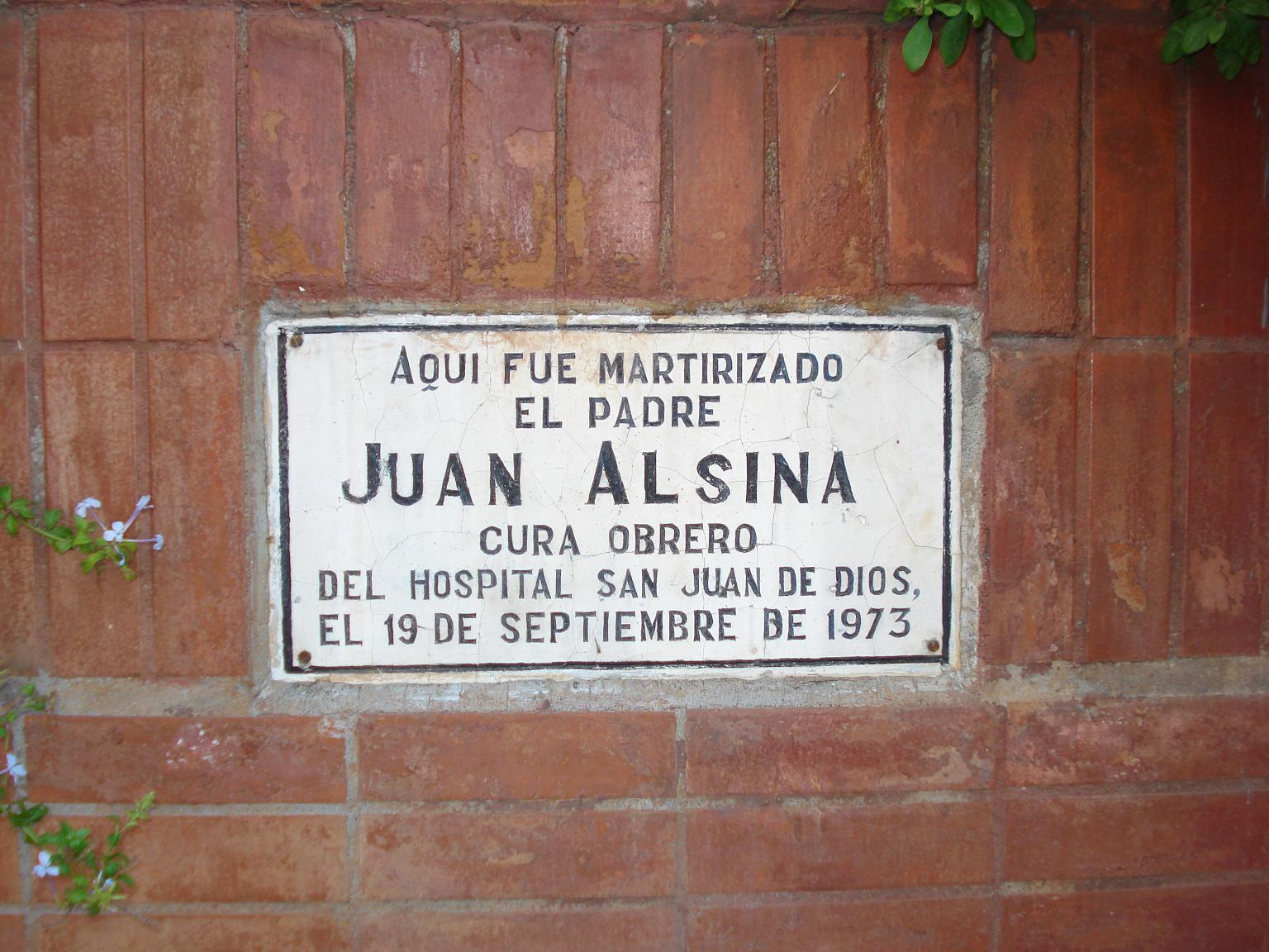 Joan Alsina Hurtos (Castellón de Ampurias (Gerona) España, 28 de abril de 1942 - † Santiago de Chile, 19 de septiembre de 1973). Sacerdote católico español, asesinado en Chile tras el Golpe de Estado del 11 de septiembre de 1973.